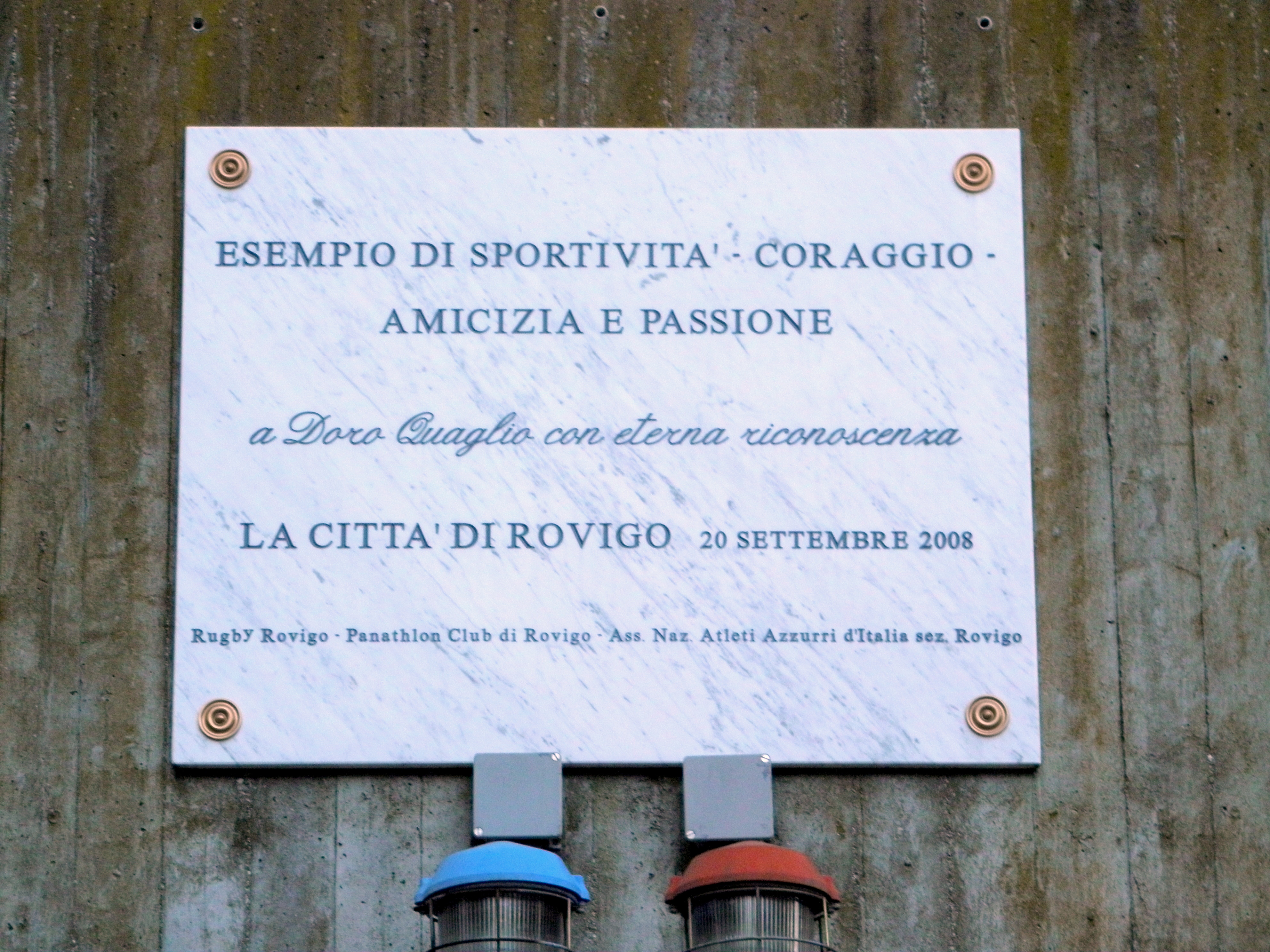 Rovigo, Stadio Mario Battaglini: lapide commemorativa dedicata a Isidoro "Doro" Quaglio presente sulla tribuna a lui dedicata.